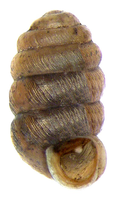 Familie: Pupillidae Groesse: 3,4 x 1,7 mm Verbreitung; holarktisch Fundort: Germania, Bayern, Oberfranken, Weismain leg.det. U.Schmidt, 1983 Photo: U.Schmidt, 2007